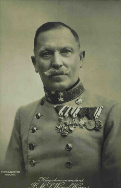 Wenzel Wurm (1859-1921), Austrian-Hungarian general